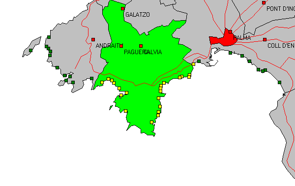 Skizze Strände Calviá